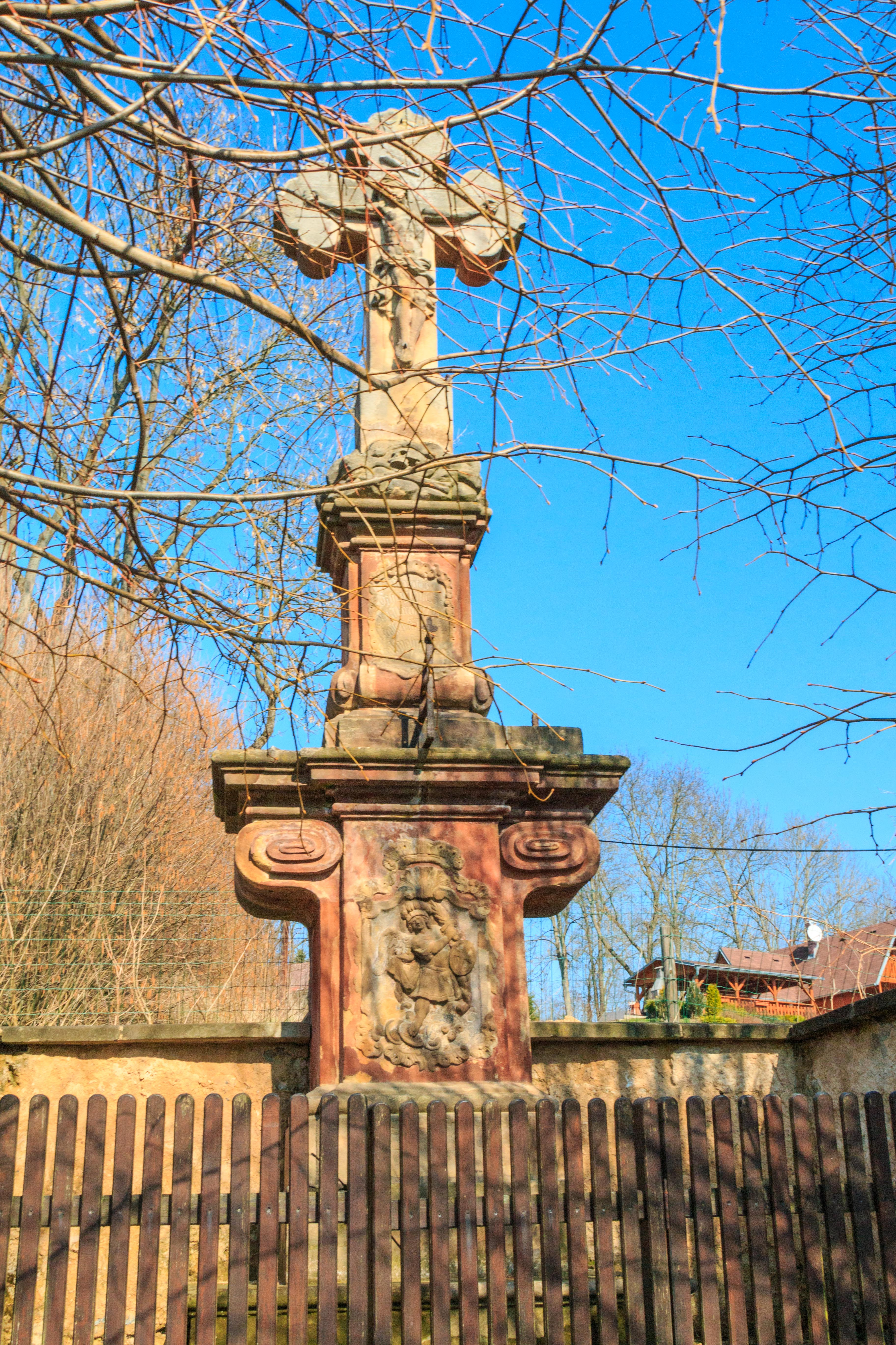 Sousoší Kalvárie / svatého Vavřince a Donáta, okraj obce, směr na Bystřici, Sedliště (okres Jičín).